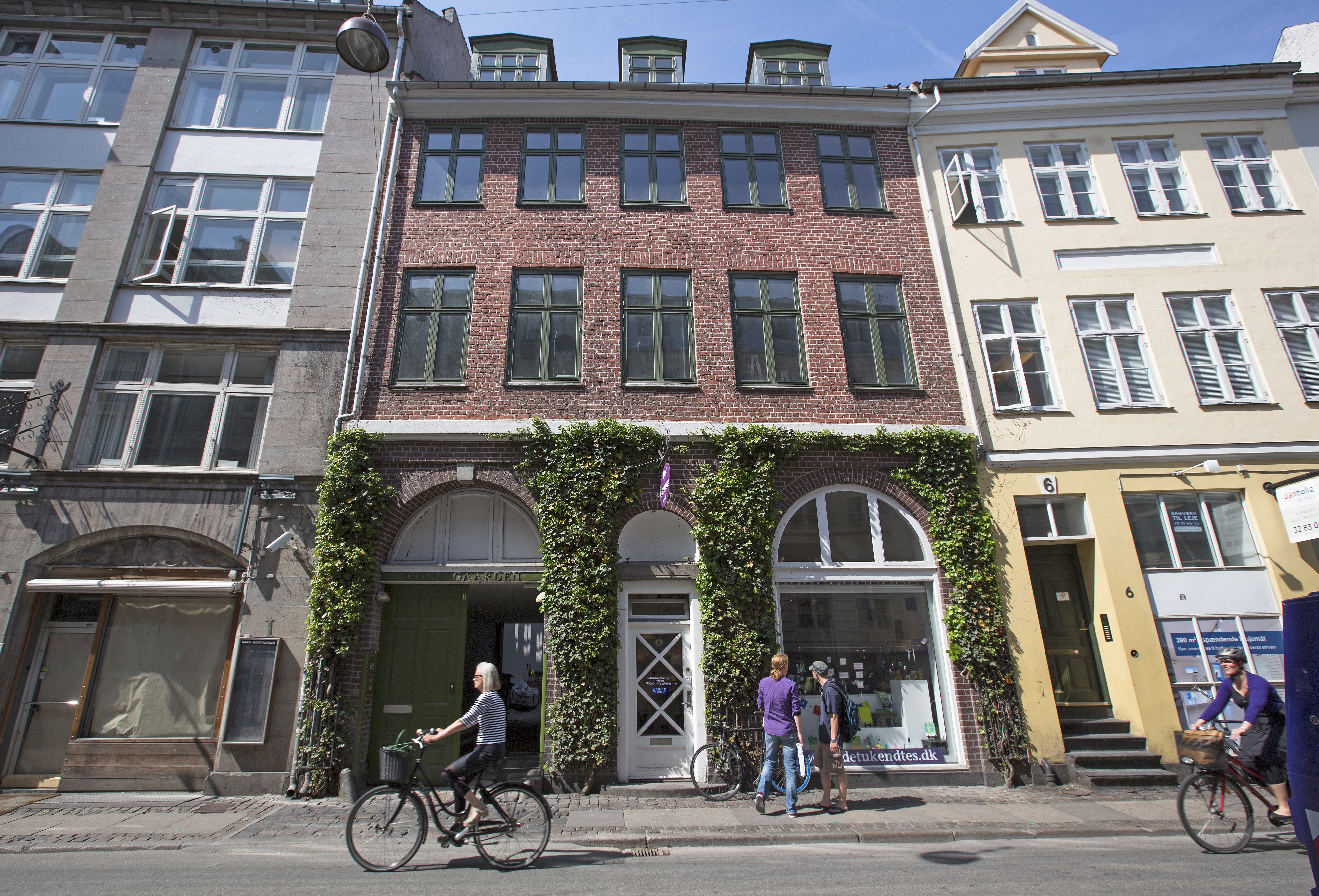 Danish Institute for Study Abroad, DIS, har de senaste åren köpt och omvandlat fyra fastigheter i centrala Köpenhamn till sammanlagt 125 studentbostäder för amerikanska studenter. Fastigheten på Vestergade 8 renoverades förra året. Photo: News Øresund - Jenny Andersson© News ØresundDetta verk av News Øresund är licensierat under en Creative Commons Erkännande 3.0 Unported-licens (CC BY 3.0). Bilden får fritt publiceras under förutsättning att källa anges (Foto: News Øresund + fotografnamn). The picture can be used freely under the prerequisite that the source is given .News Øresund, Malmö, Sweden. Øresund är en oberoende regional nyhetsbyrå som ingår i projektet Øresund Media Platform som drivs av Øresundsinstituttet i partnerskap med Lunds universitet och Roskilde Universitet och med delfinansiering från EU (Interreg IV A Öresund) och 14 regionala; icke kommersiella aktörer.